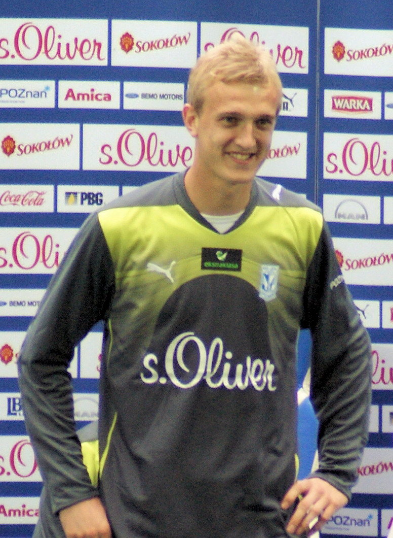 Jasmin Burić - gracz Lecha Poznań - prezentacja piłkarzy na Stadionie Miejskim przed sezonem 2010/2011.